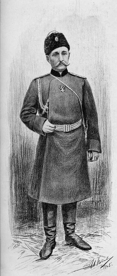 Генерал-адъютант Павел Иванович Мищенко